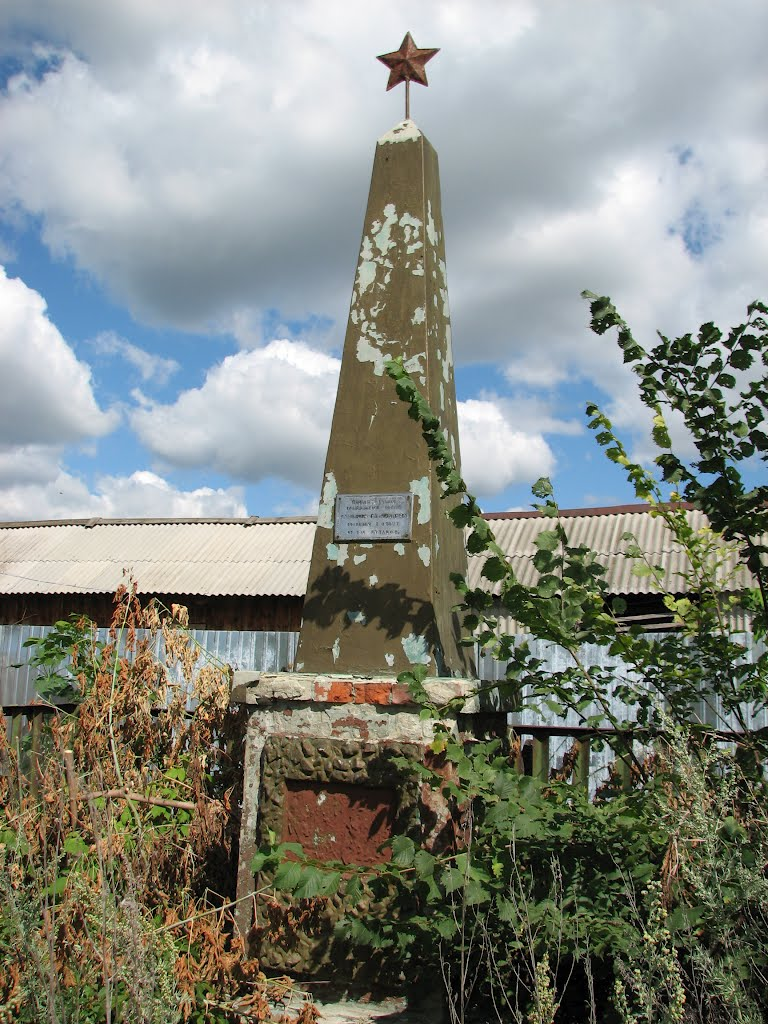 омни свою историю. Памятник организаторам Советской власти в с. Гавриловка (б. Горюшка) Г.А. Данилову и М.Д. Чегодаеву, убитым в 1919 г. Фото И. Нефедова